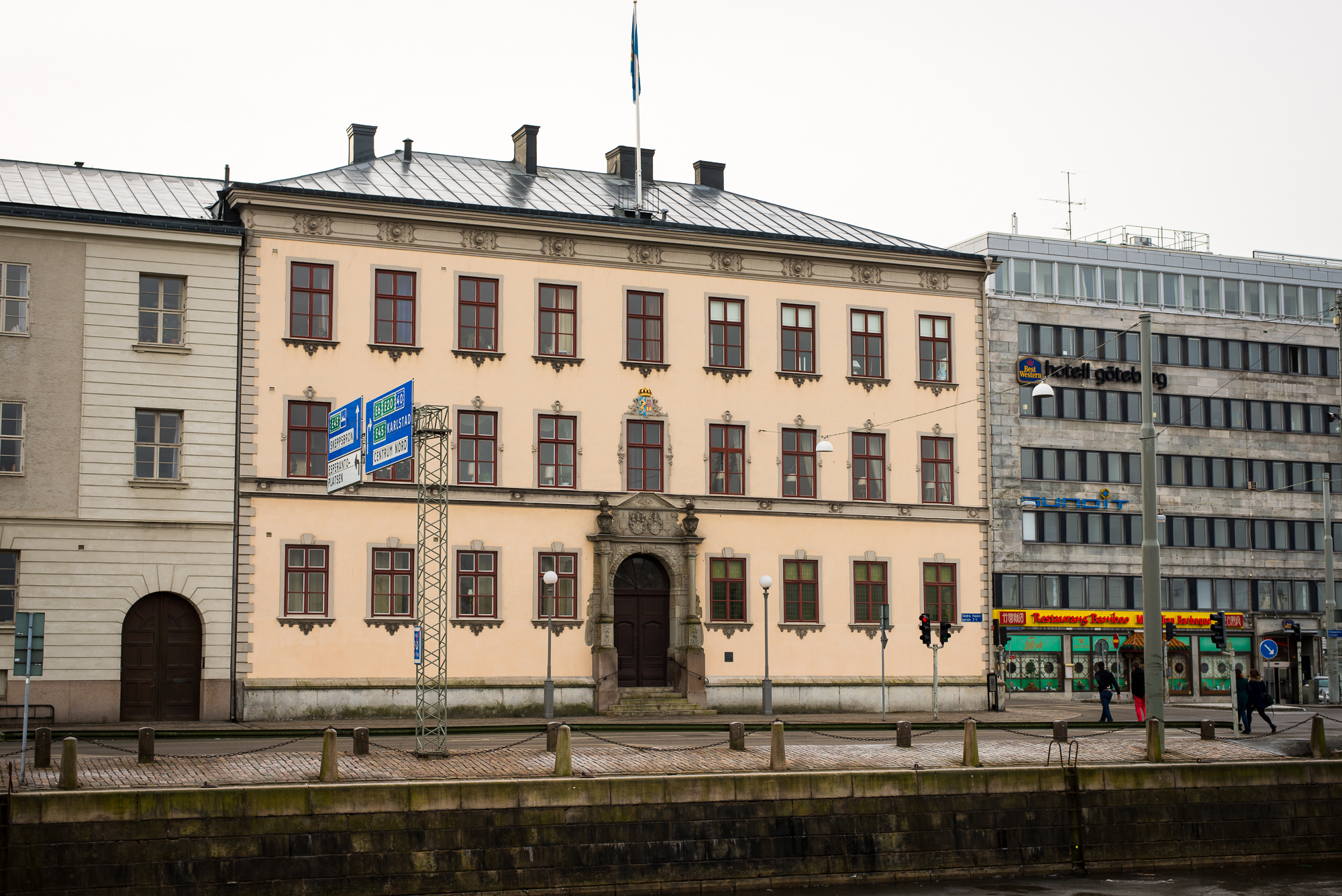 Landshövdingeresidenset i Göteborg, februari 2013.